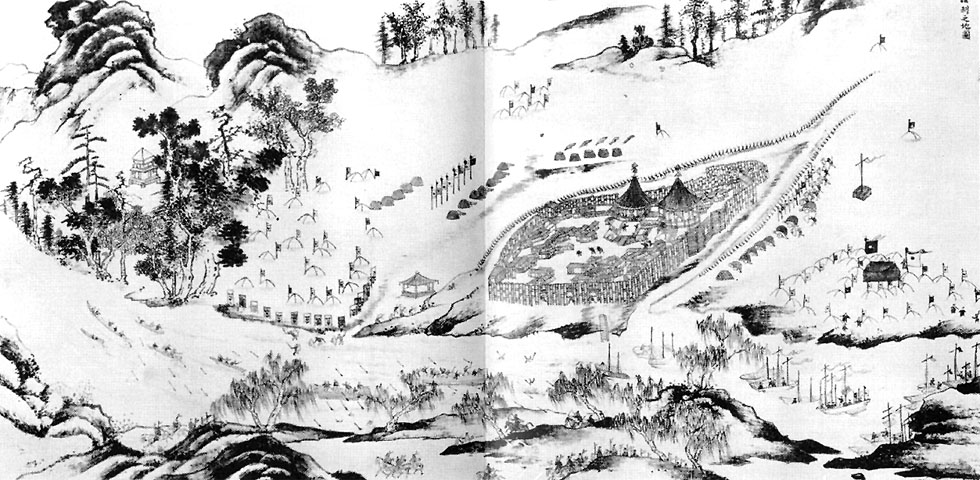 Осада Албазина. Китайский рисунок конца XVII века. Из собрания Библиотеки Конгресса США